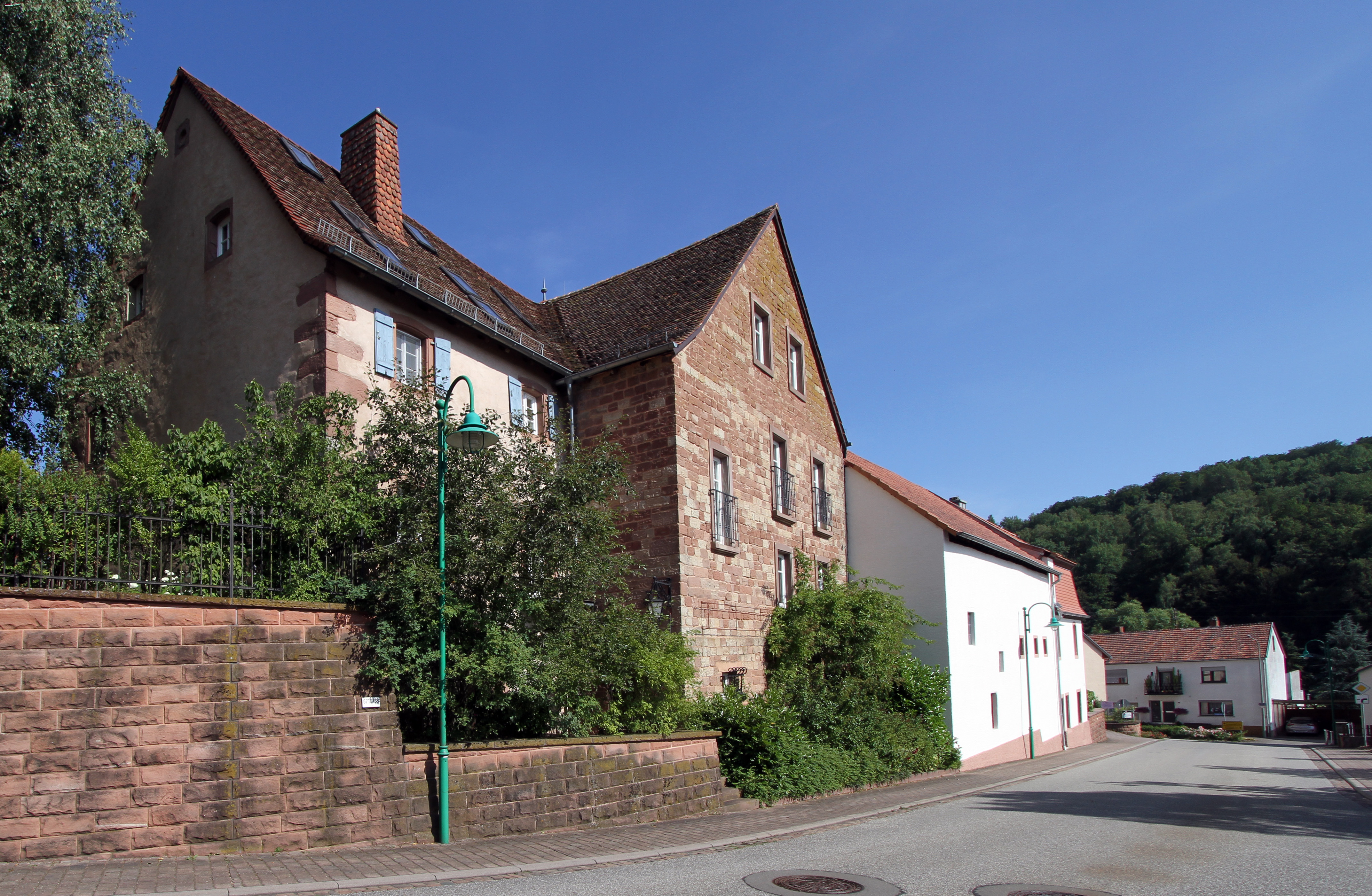 Walshausen